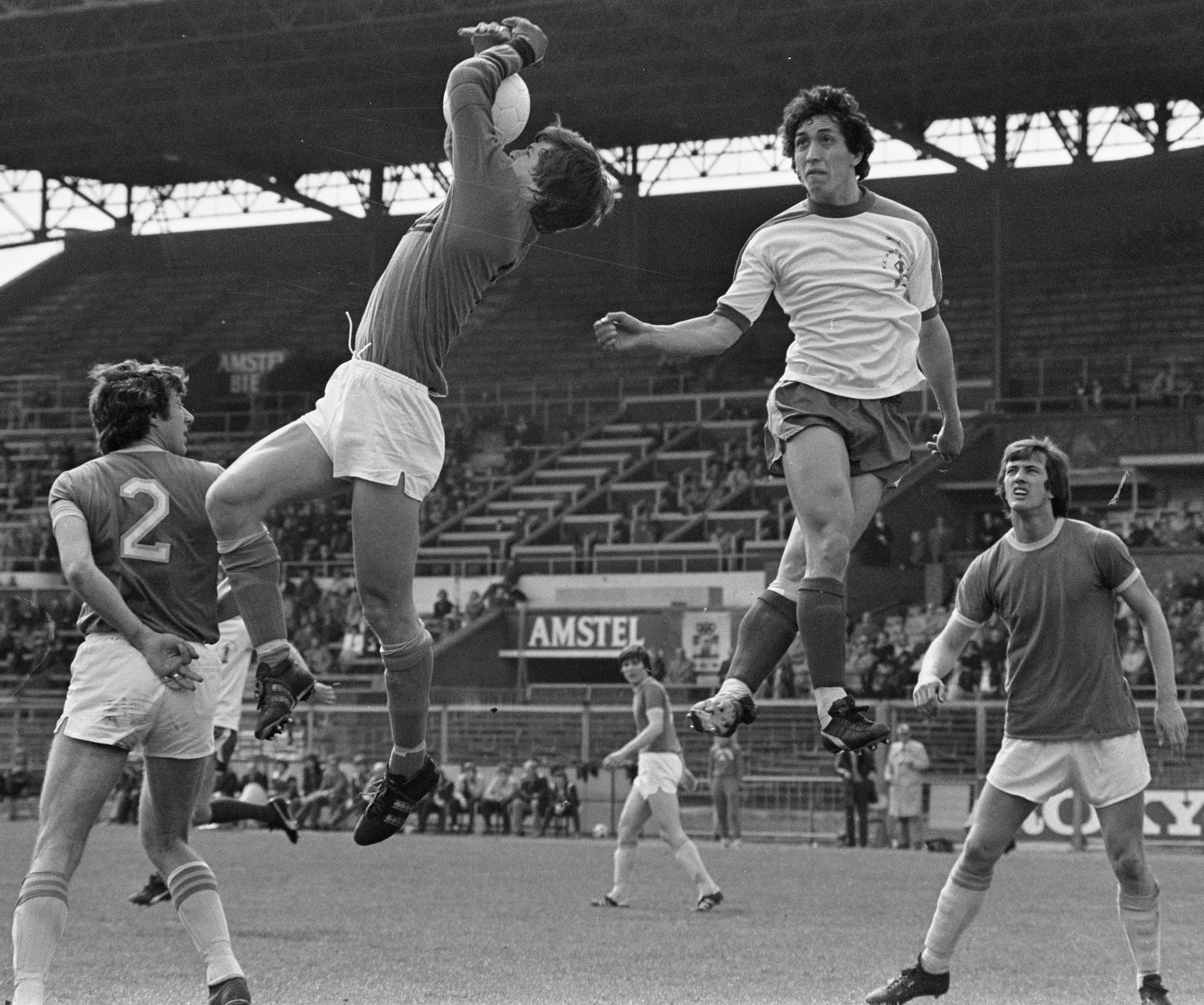 Voetbalwedstrijd FC Amsterdam - FC Den Haag (1-1). Den Haag-doelman Hans Galjé plukt de bal weg voor Amsterdam-speler André Wetzel